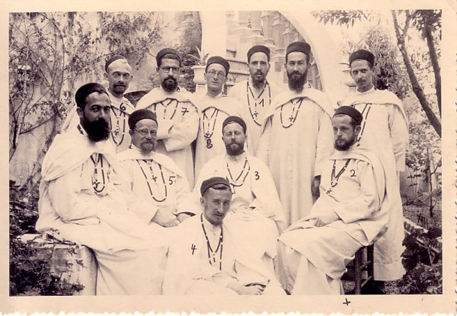 Année scolaire à l'Institut des belles lettres arabes de Tunis fondé par les Pères blancs. 1) Jacques Lanfry, étudiant 2) Georges Mercier, directeur des études 3) André Demeerseman, supérieur 4) Henri Becquart, étudiant 5) Léon Lepers, secrétaire 6) Albert Renoncer, professeur 7) Georges Letellier, professeur 8) Roger Duvollet, étudiant 9) Jean-Marie Dallet, étudiant 10) Léon Harmel, étudiant 11) Joseph Lusson, étudiant.